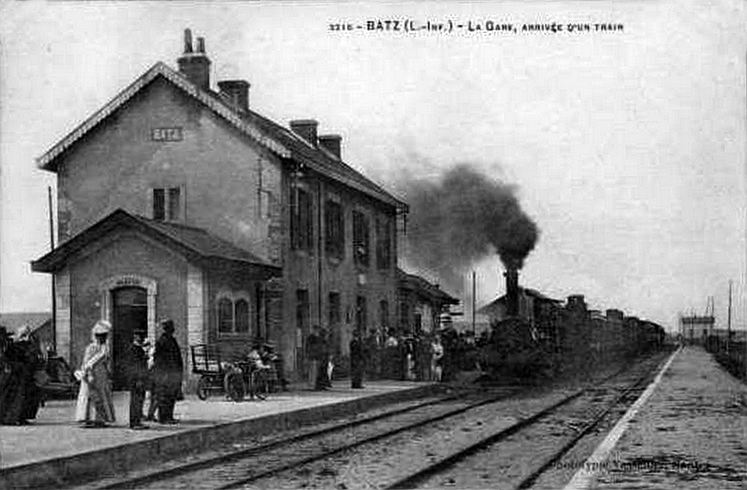 La gare de Batz vers 1900, avec un bâtiment voyageurs agrandi et deux voies.